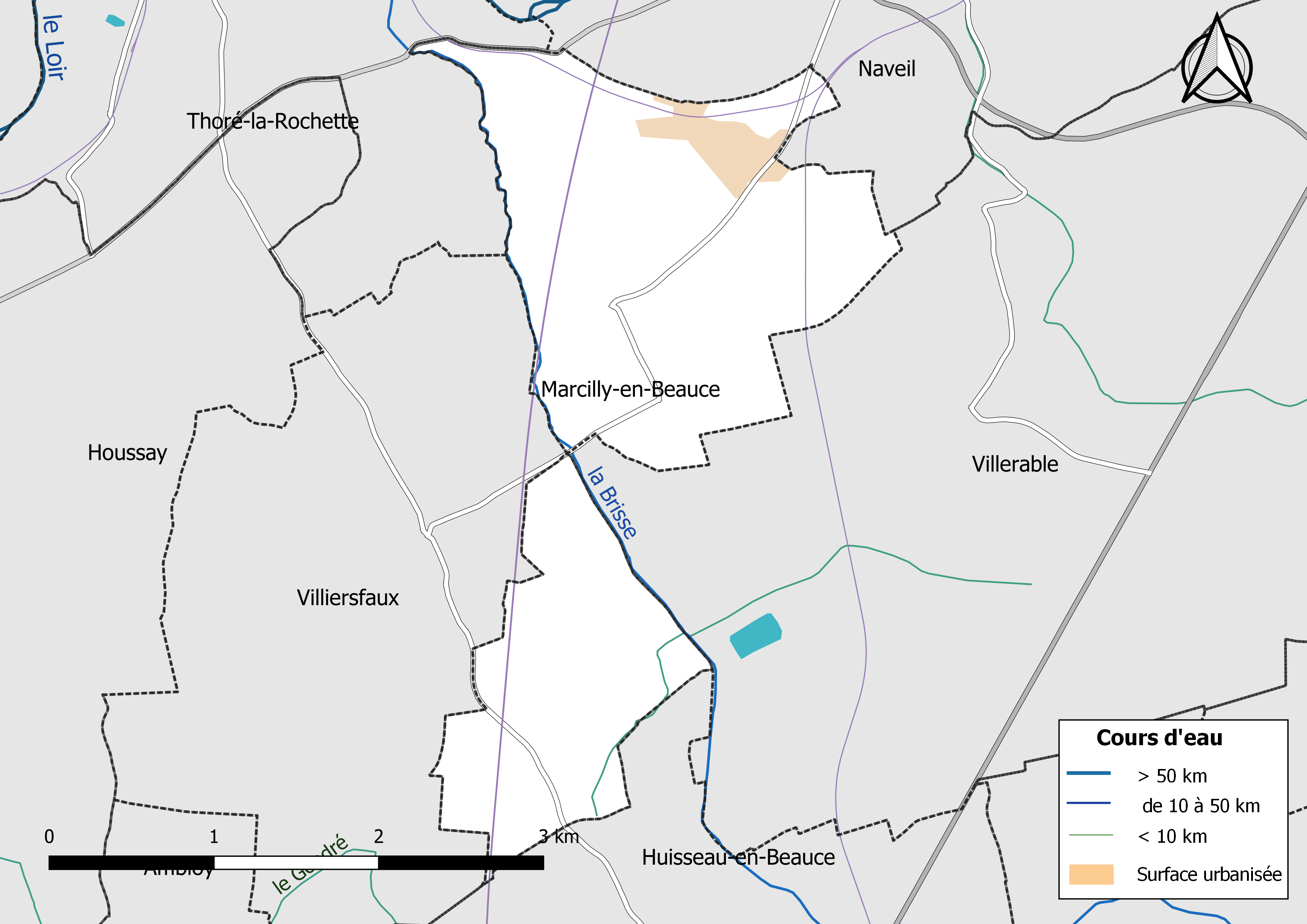 Carte du réseau hydrographique de la commune de Marcilly-en-Beauce (Loir-et-Cher, France).